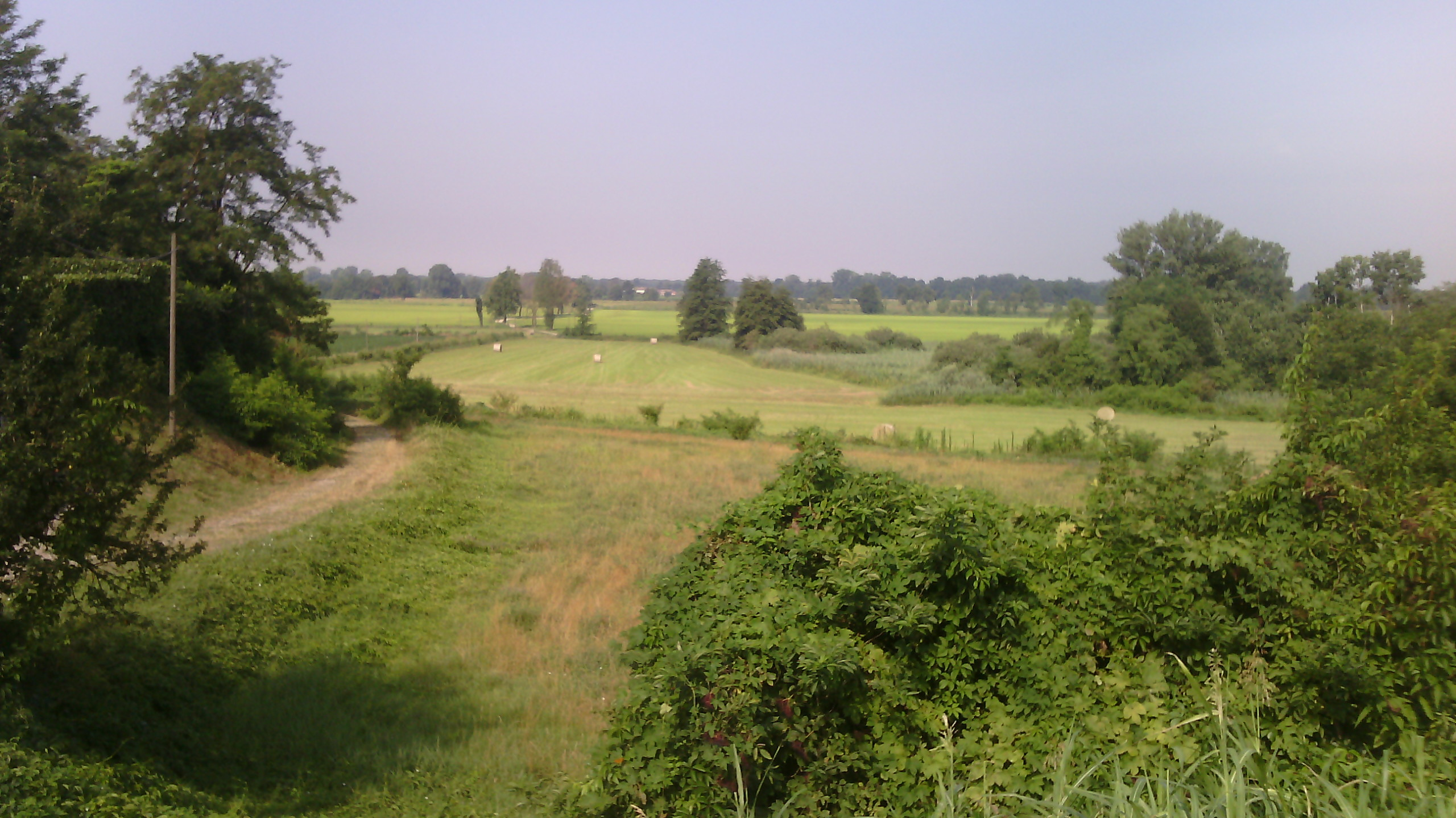 Panorama delle campagne attorno a Fallavecchia, Morimondo (MI)